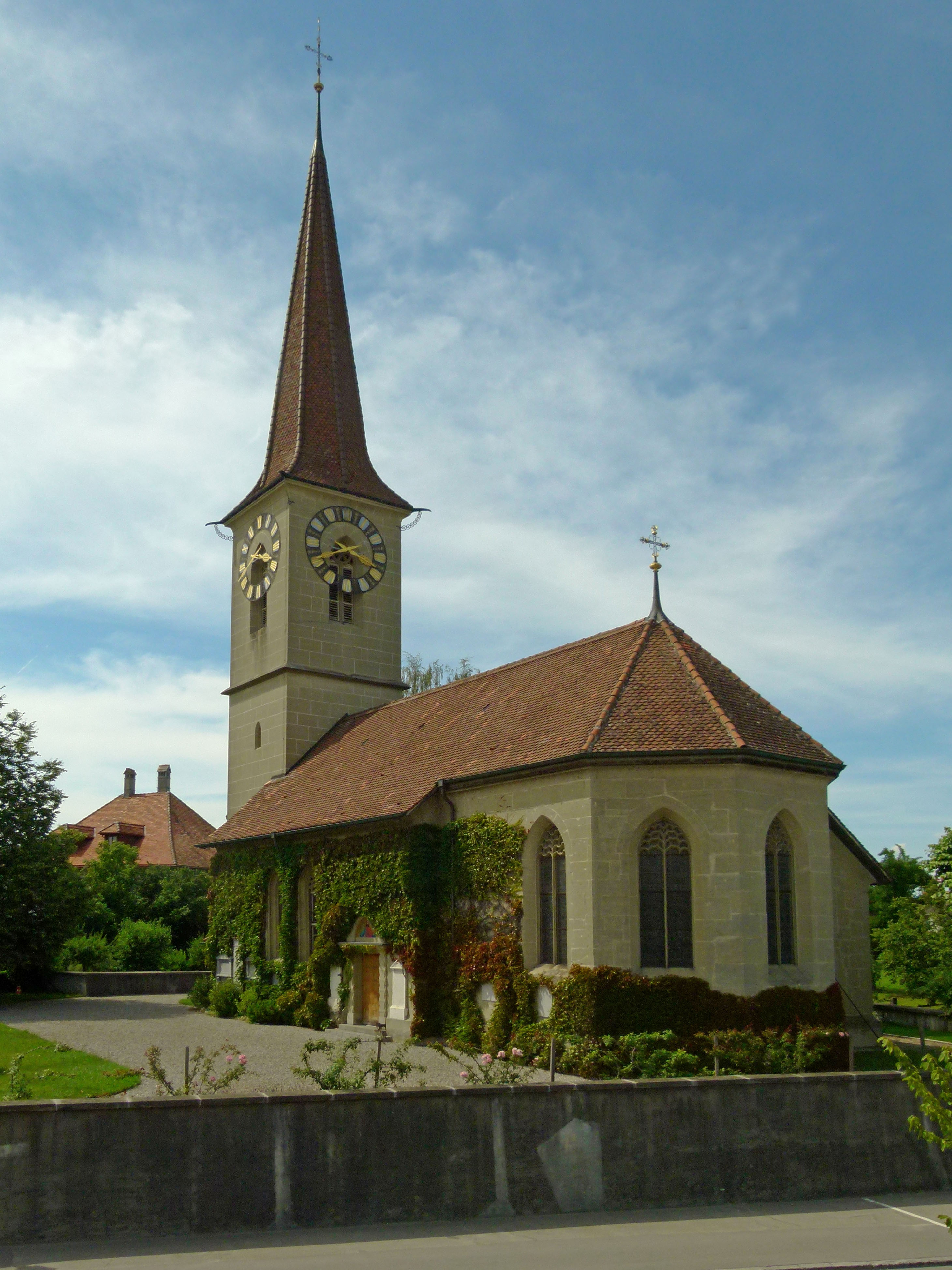 Kirche Hindelbank, erbaut 1517/18, 1912 beim Dorfbrand schwer beschädigt, 1912 neu aufgebaut. In der Kirche zwei Kunstwerke: Das Grabmal für Hironymus v.Erlach und das Denkmal für Pfarrersfrau Maria Magdalena Langhans, Werke des Bildhauers Johann August Nahl.